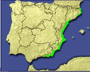 Mapa